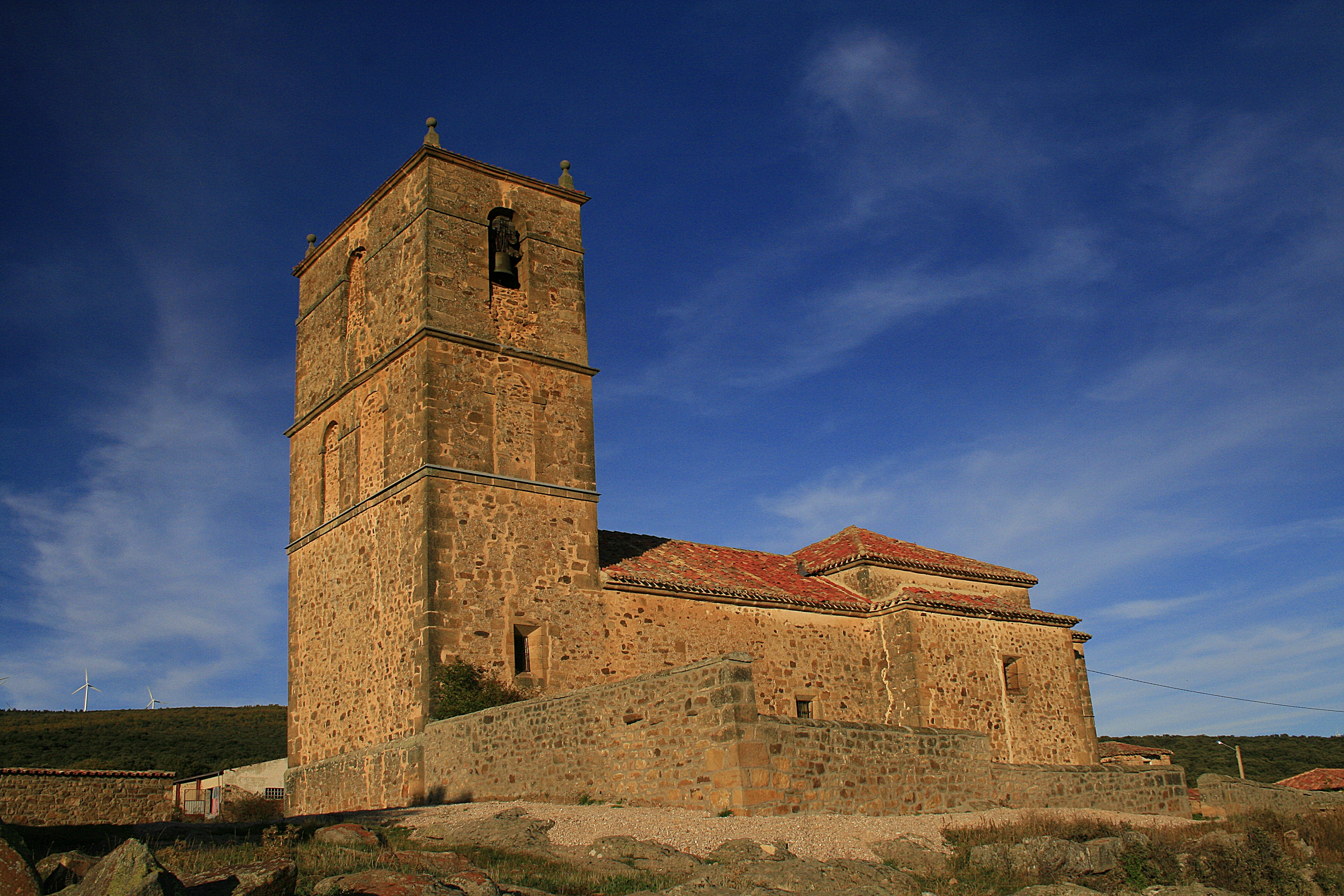 Iglesia de San Esteban Protomartir. Cortos. Soria